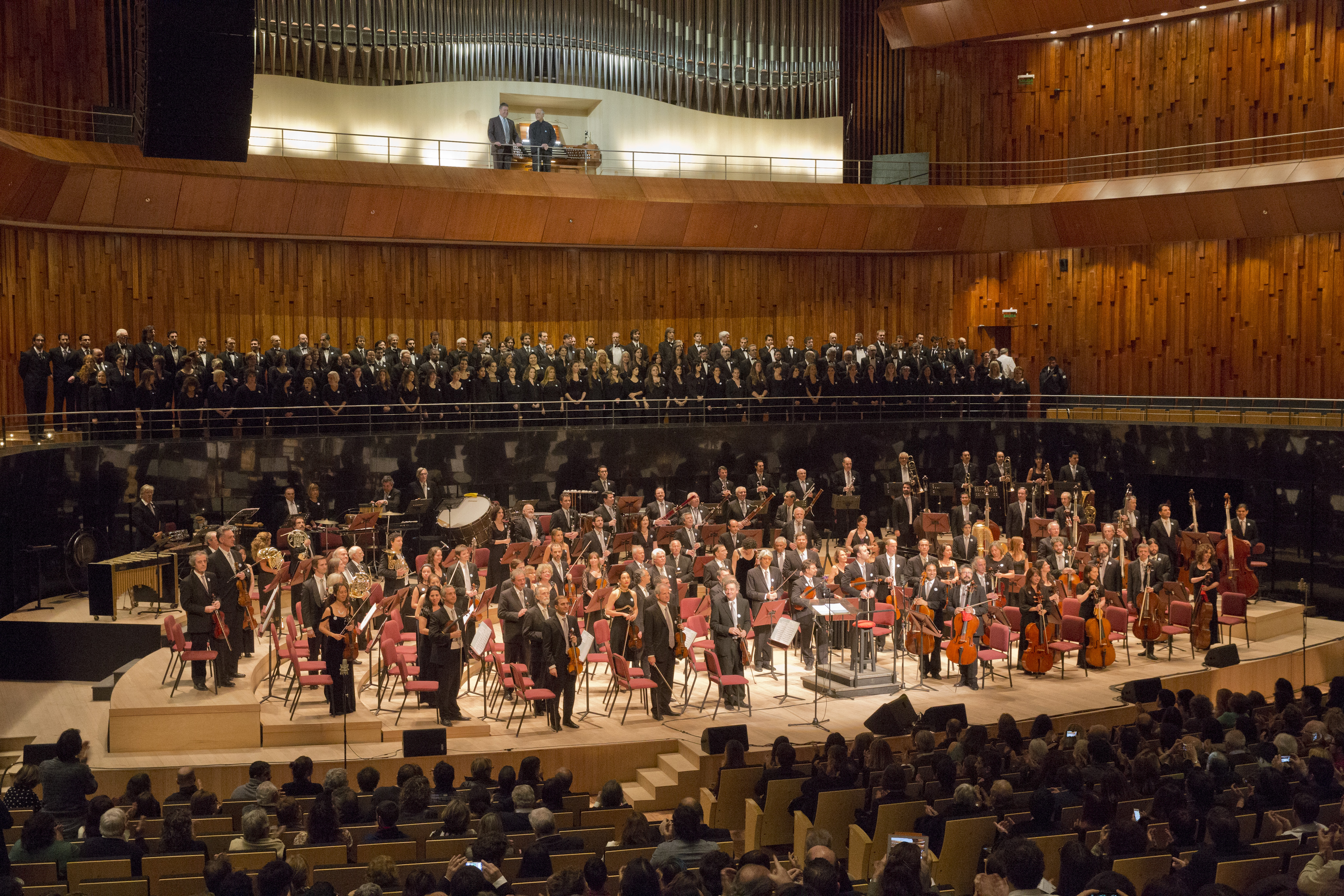 Buenos Aires, 24 de mayo de 2015- En la Ballena Azul del Centro Cultural Kirchner, la Orquesta Sinfónica Nacional, dirigida por Pedro Calderón, grabó, junto a la cantante Elena Roger, el Himno Nacional para transmitirlo por la TV Pública. Estuvieron presentes, la ministra de Cultura de la Nación, Teresa Parodi; el ministro de Planificación Federal, Inversión Pública y Servicios; Julio De Vido; la ministra de Industria, Débora Giorgi; la ministra de Desarollo Social, Alicia Kirchner; el ministro de Trabajo, Empleo y Seguridad Social, Carlos Tomada; el ministro de Educación, Alberto Sileoni; y director de Aerolineas Argentinas, Mariano Recalde. Fotos: Margarita Solé / Ministerio de Cultura de la Nación